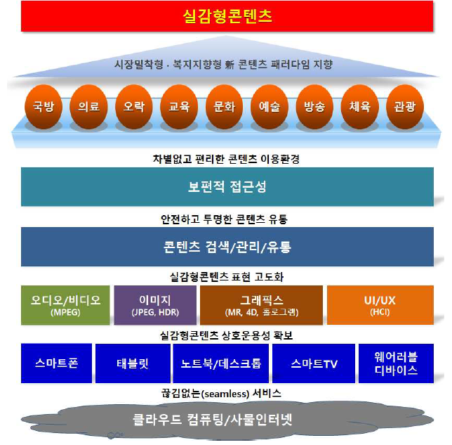 K-ICT 표준화전략맵 Ver.2016 종합보고서 2 디지털콘텐츠,SW,기반SW/컴퓨팅 분야(정부 기금사업 연구결과물 TTA-15106-SD)